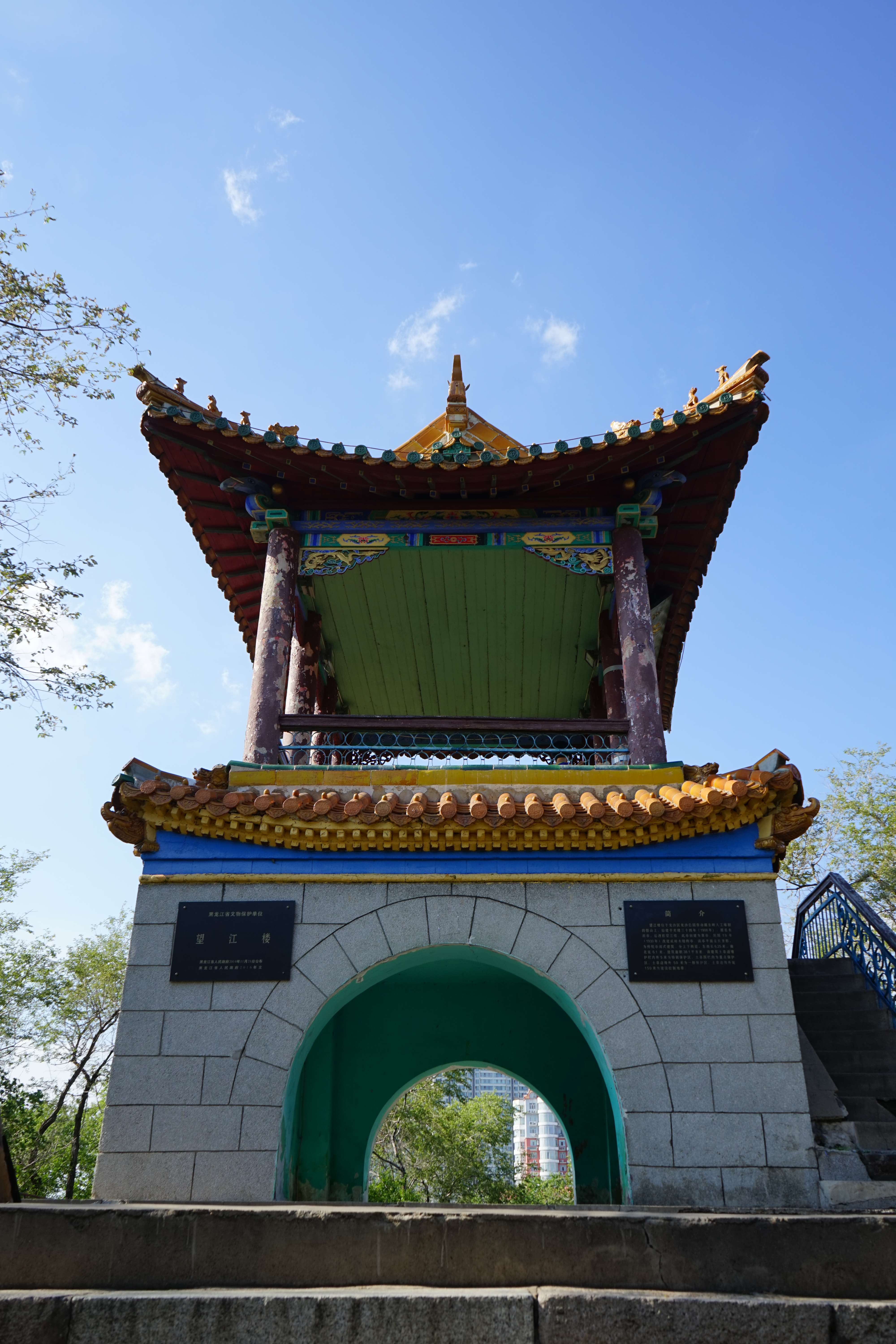 龙沙公园望江楼。文保牌。